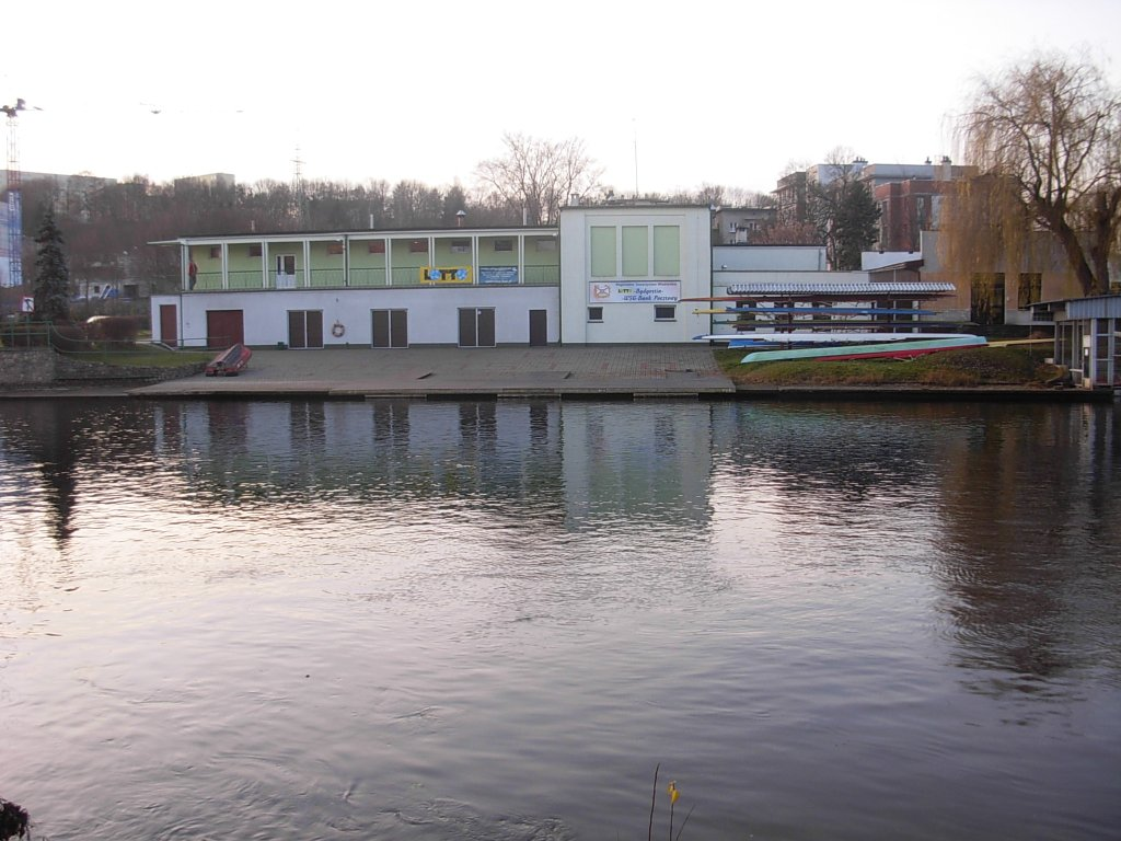 Klub wioślarski Lotto Bydgostia WSG Bank Pocztowy